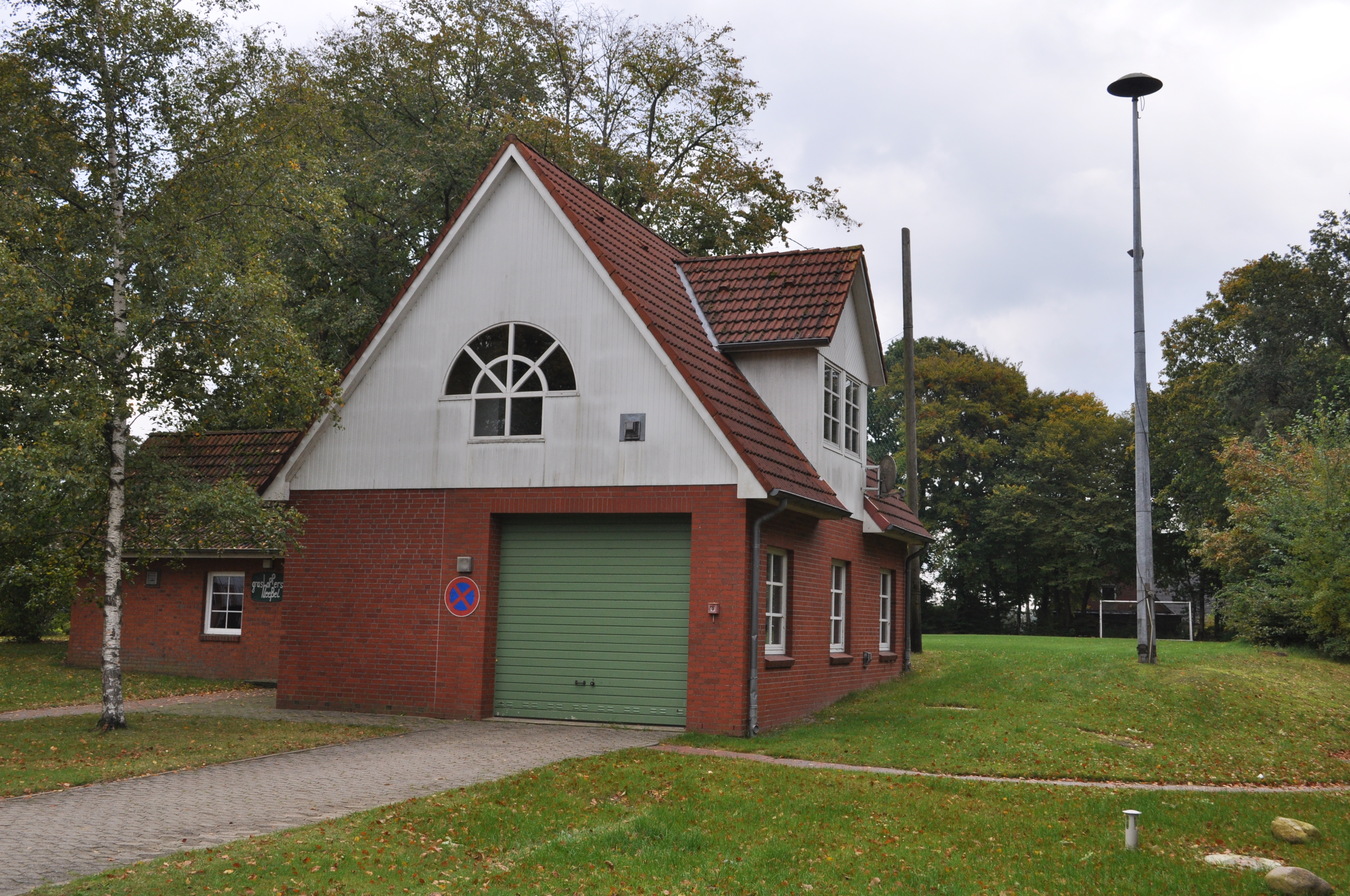 Gebäude der Freiwilligen Feuerwehr Heeßel.